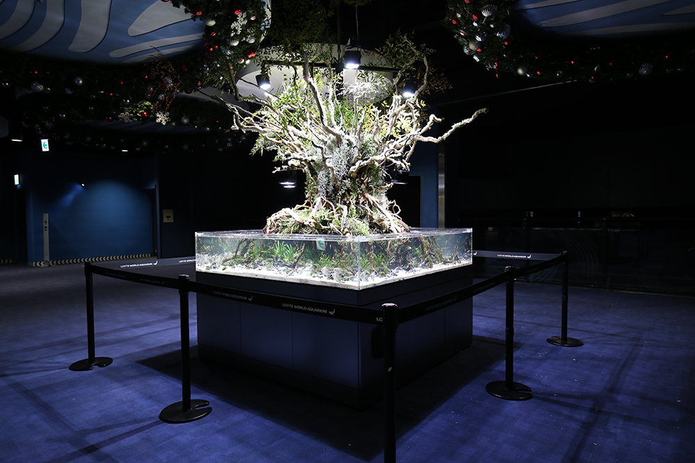 2017 롯데아쿠아리움 소장, 국내 최대 팔루다리움